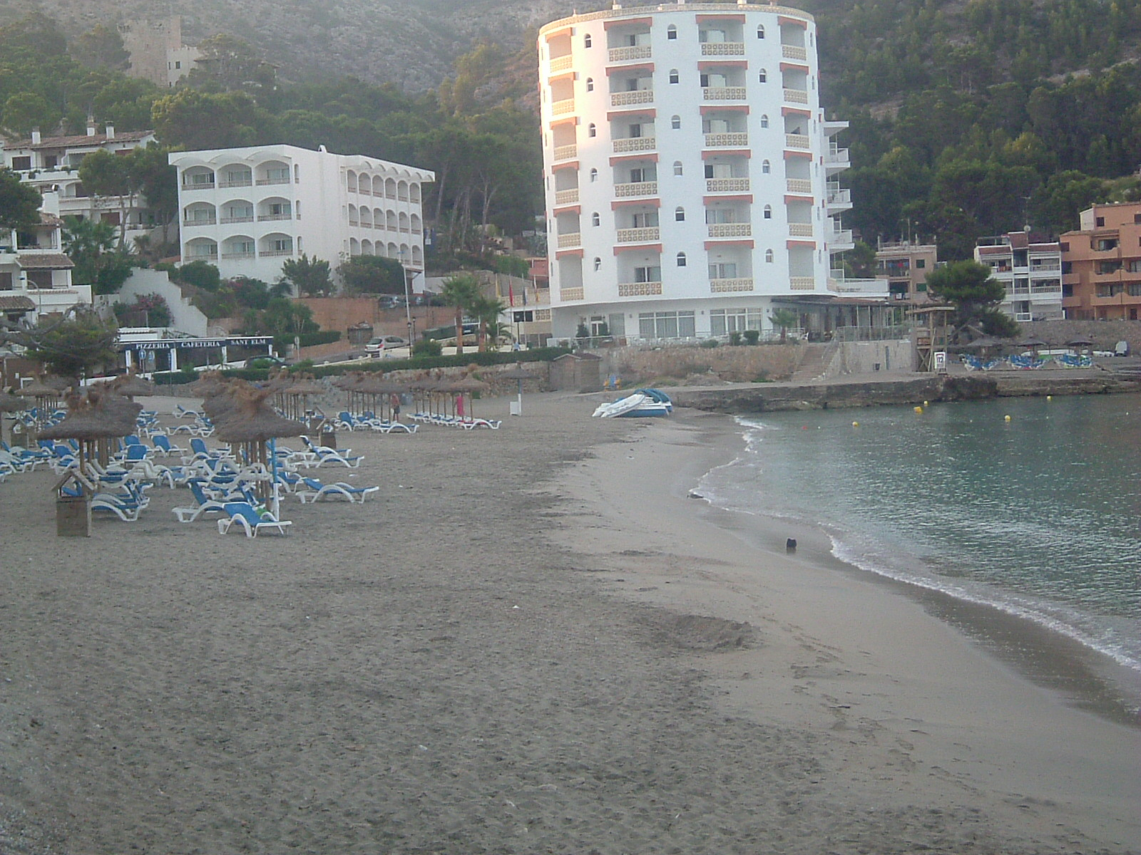 Blick auf den Strand von Sant Elm (Mallorca)